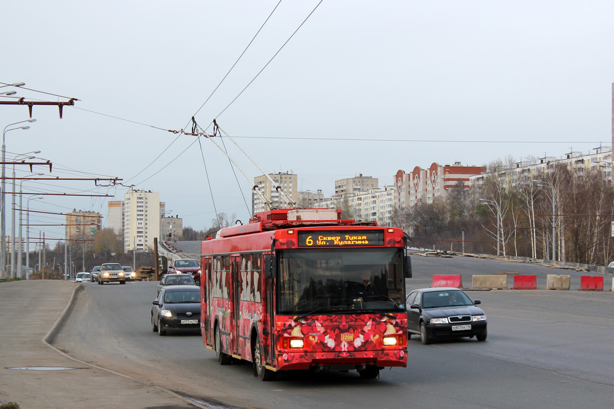 Троллейбус ТролЗа Оптима Люкс